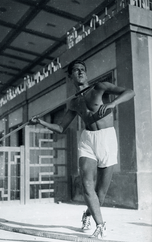 Siracusano - sport - anni '30